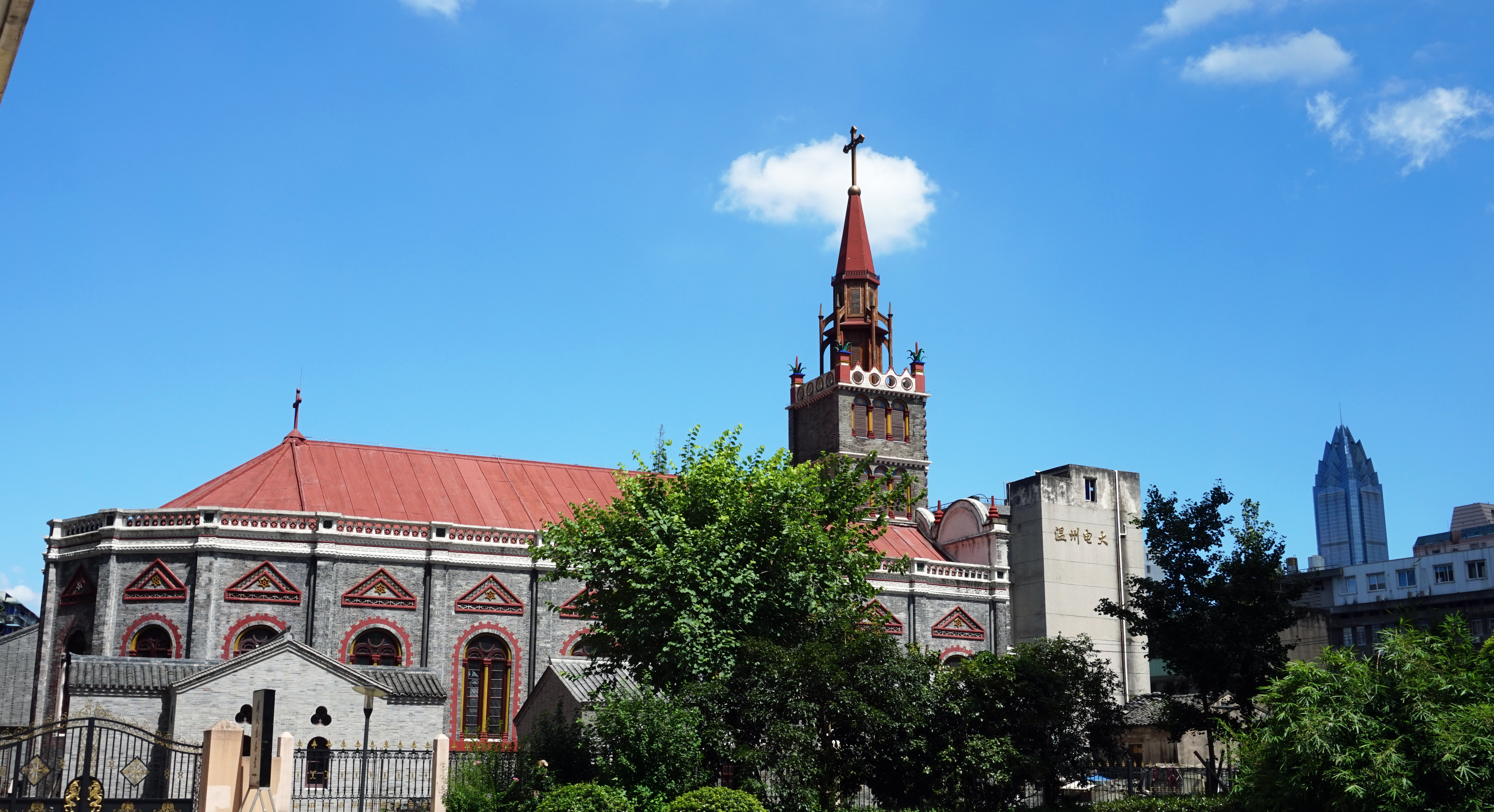 温州天主教总堂。